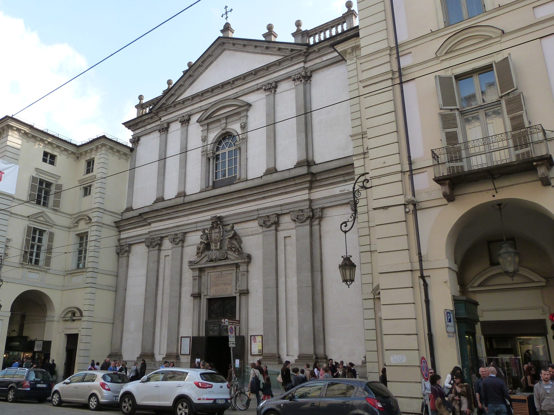 Chiesa di San Francesco da Paola in Torino, via Po